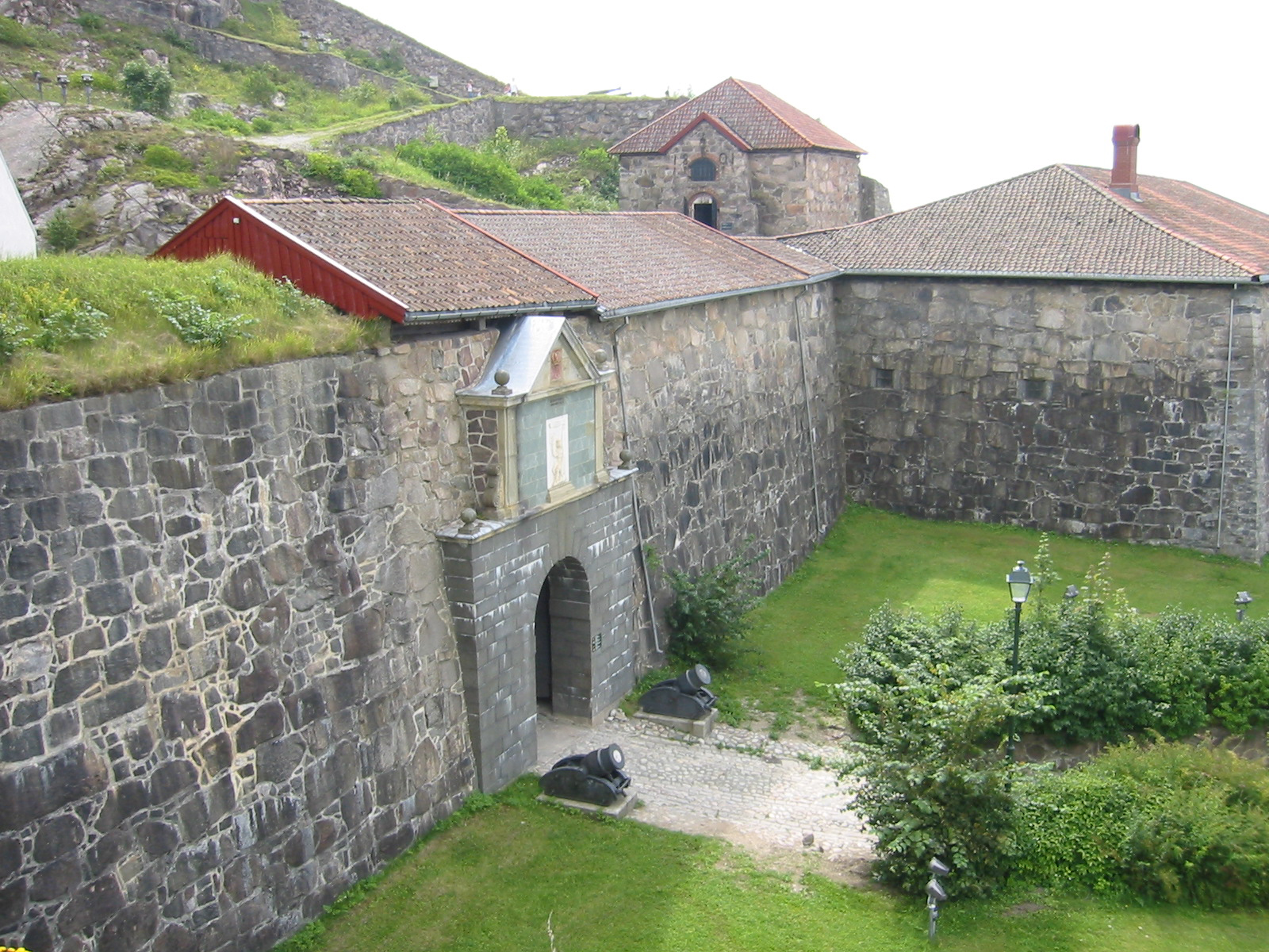 Fredriksten Festning, Halden